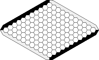 Diagrama creado inicialmente para el artículo de Wikipedia sobre el juego de tablero hex. Una alternativa es emplear el de la Wikipedia inglesa.